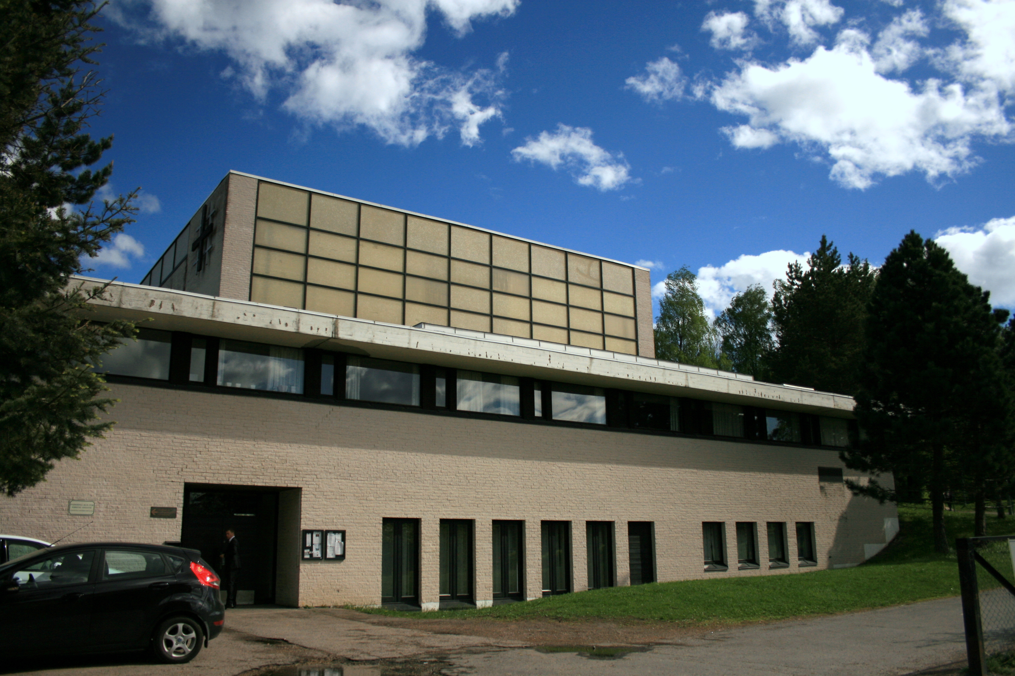 Haugerud kirke er en arbeidskirke fra 1975 i Oslo. Sett fra vest.